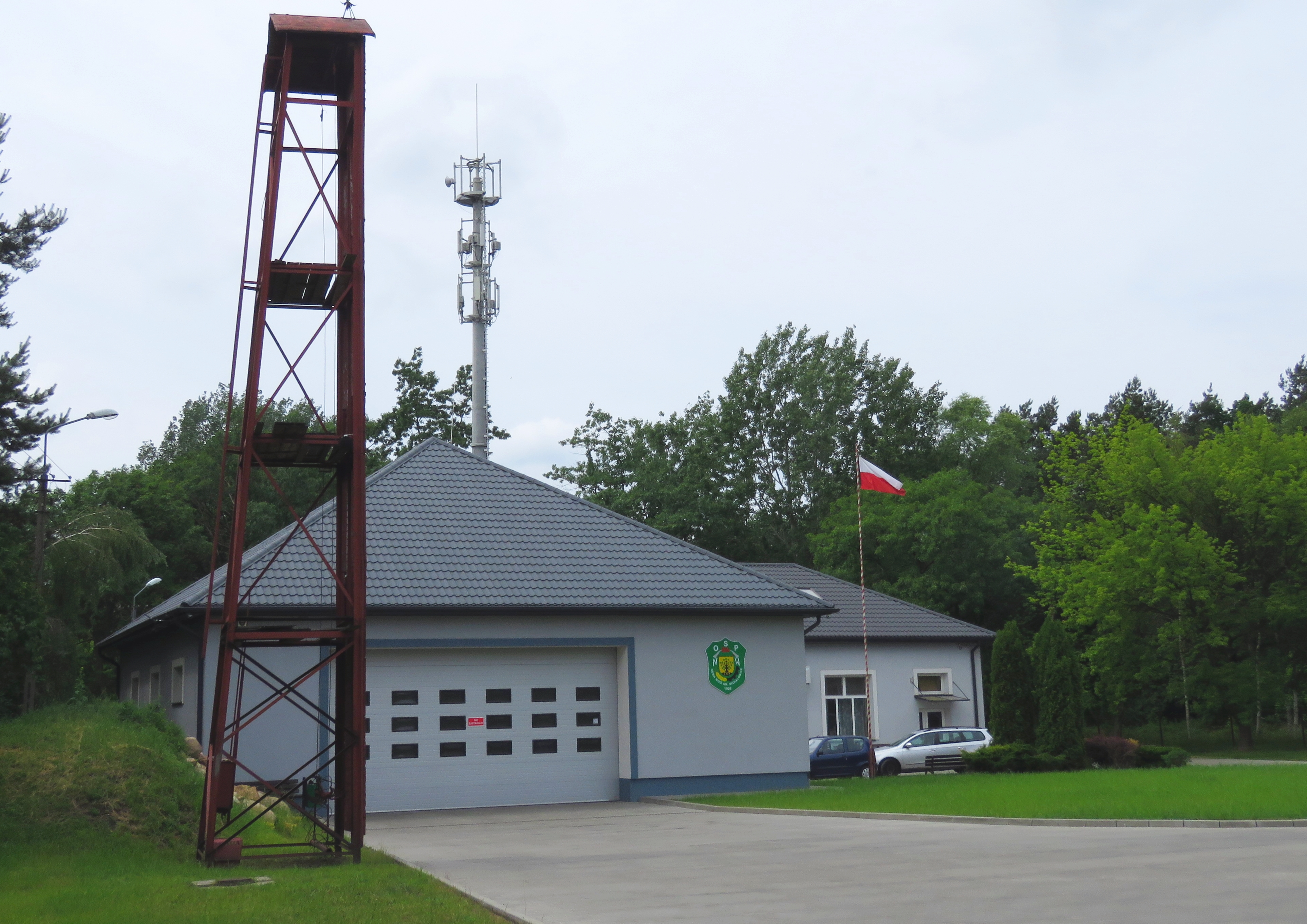 Nowa Wieś, gmina Michałowice